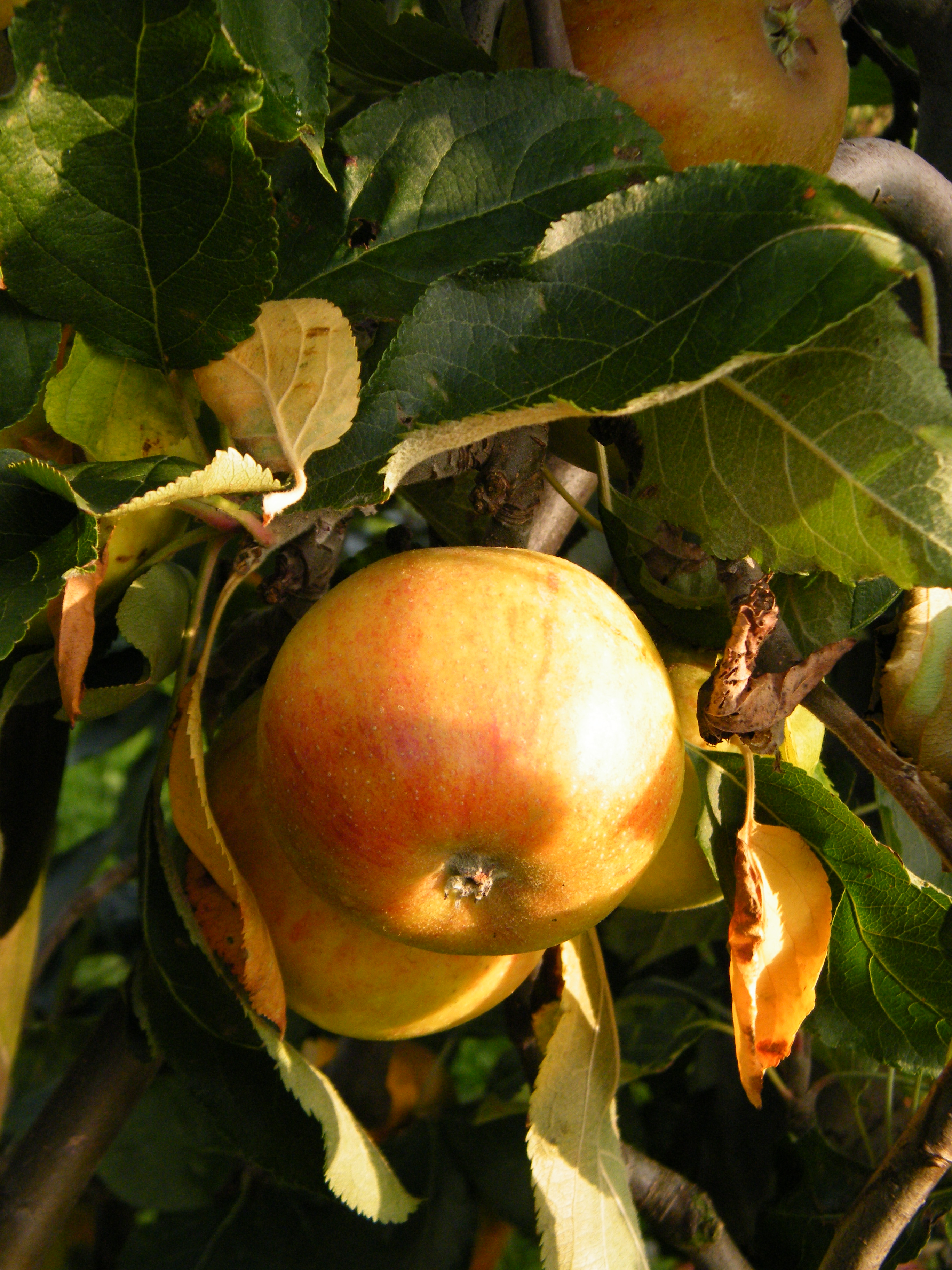 Pommes Cox, Franc-Picard, Vron, Somme,Fr